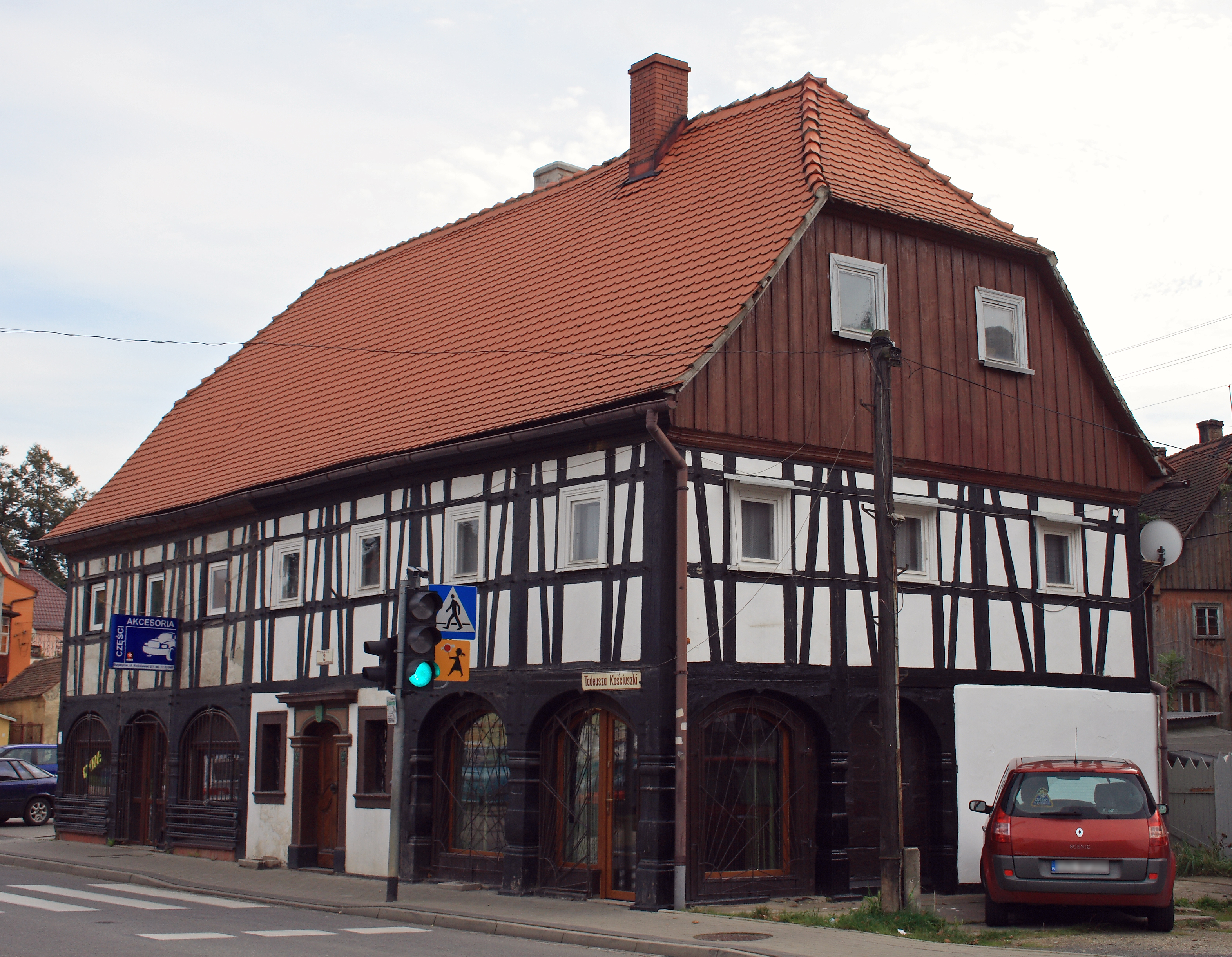 Bogatynia, dom